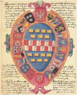 Armoiries de la Noble Confrérie d'Alten Limpurg à Francfort-sur-le-Main, d'après un manuscrit de 1608.